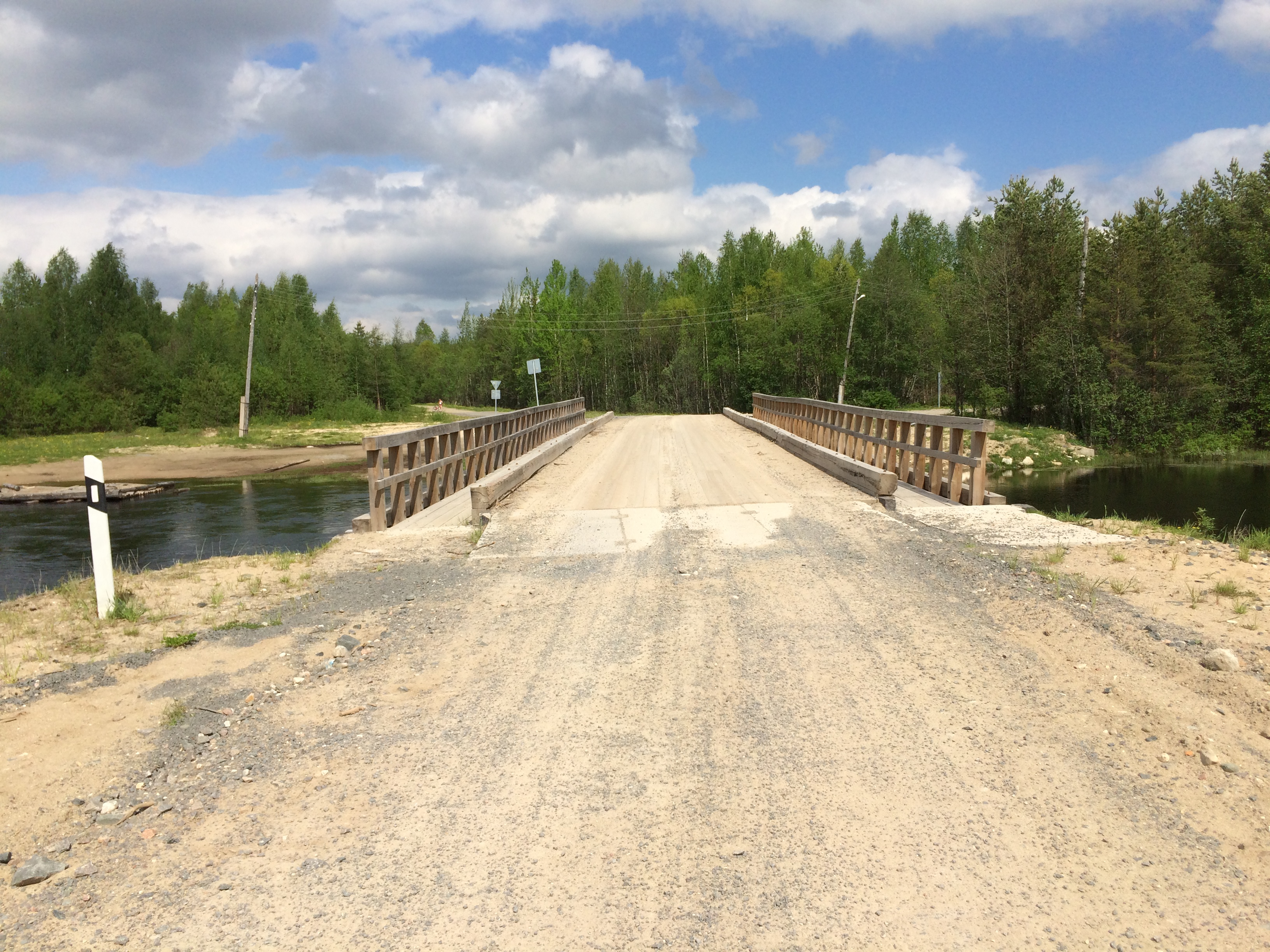 р. Гумарина